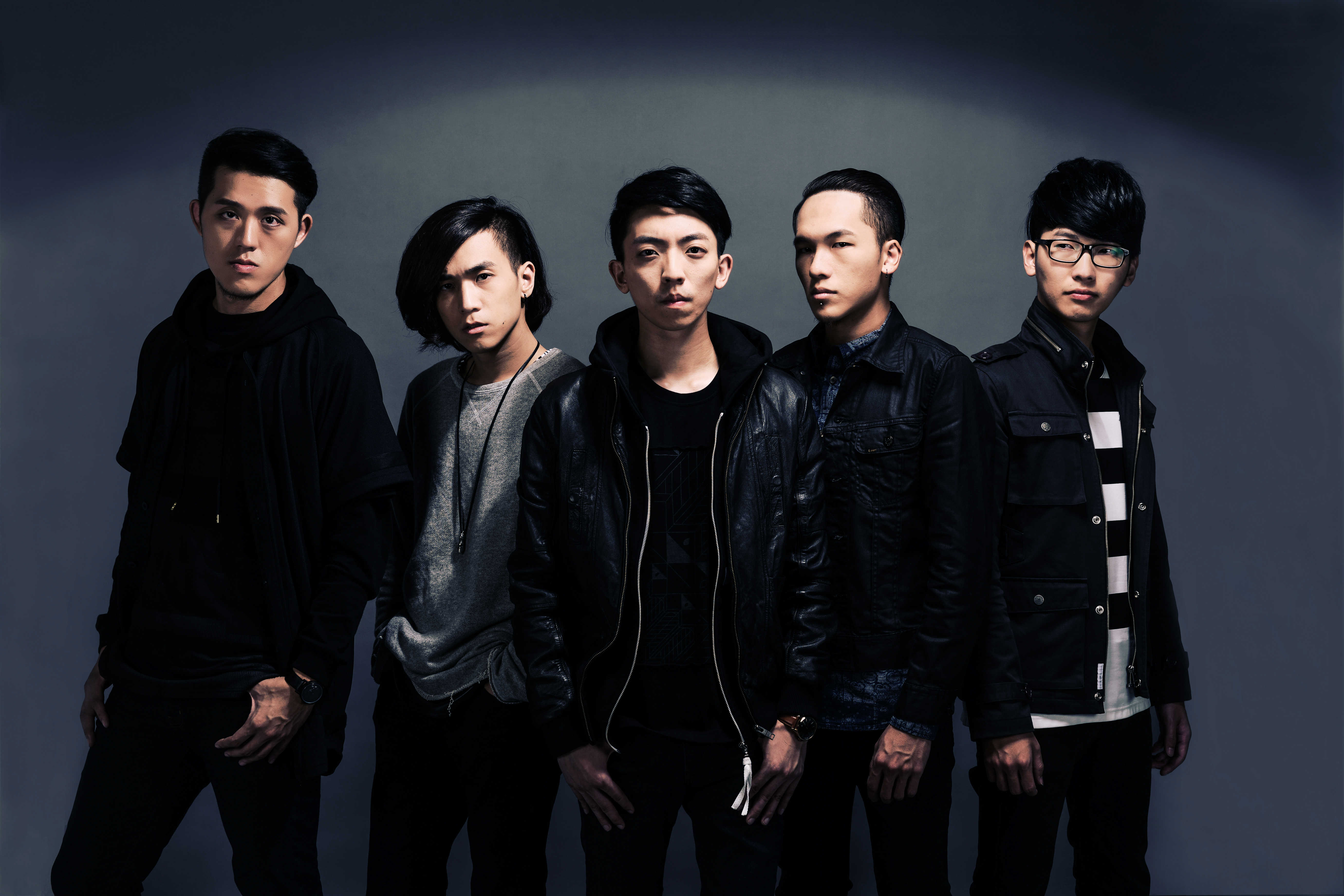 嘴哥樂團